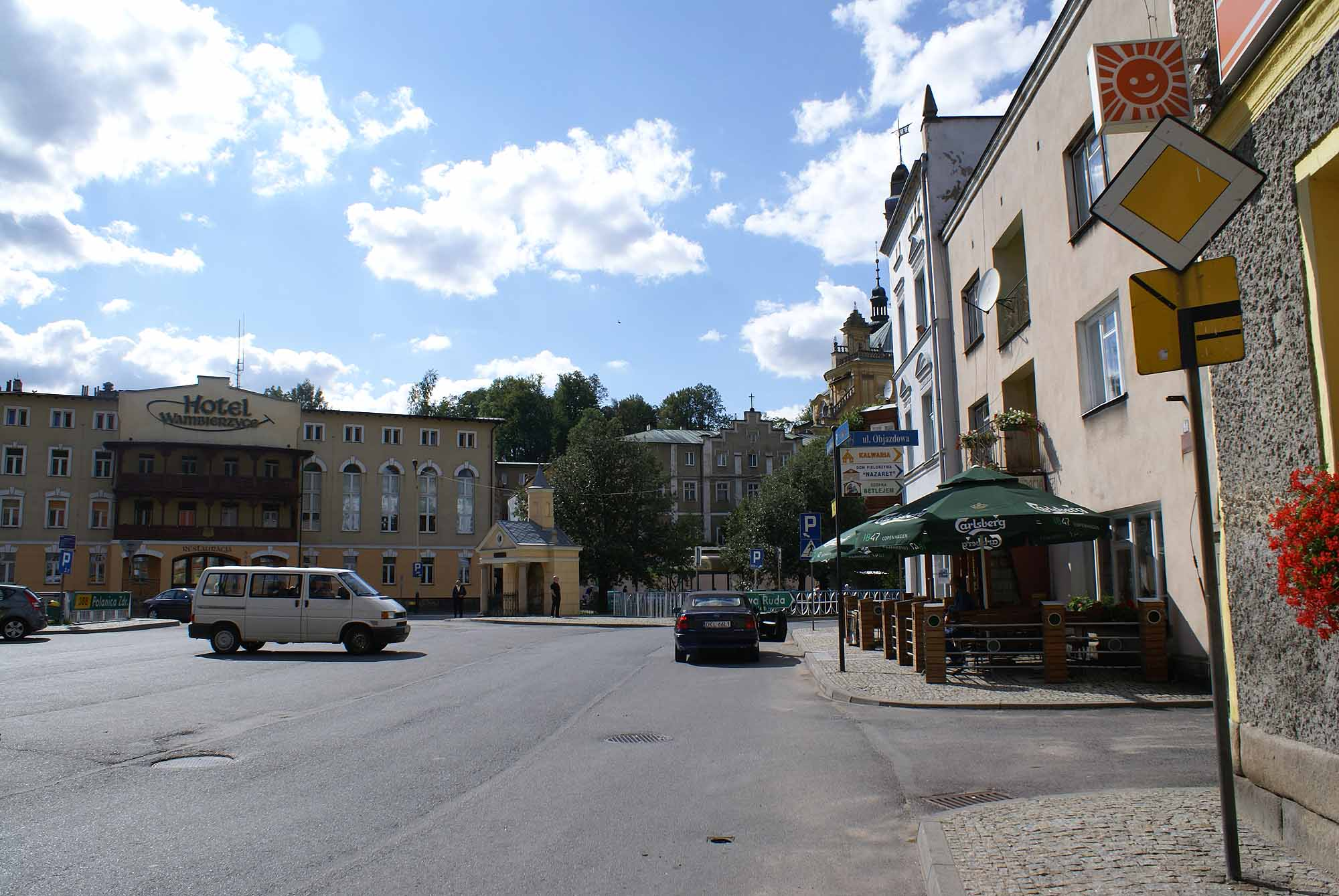 Wambierzyce, kościół par. p.w. Nawiedzenia NMP, 1695-1750